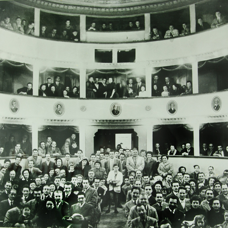 Teatro Ferrigno ad Alcamo. Si trovava anticamente dove sorge adesso il Teatro "Cielo d'Alcamo".